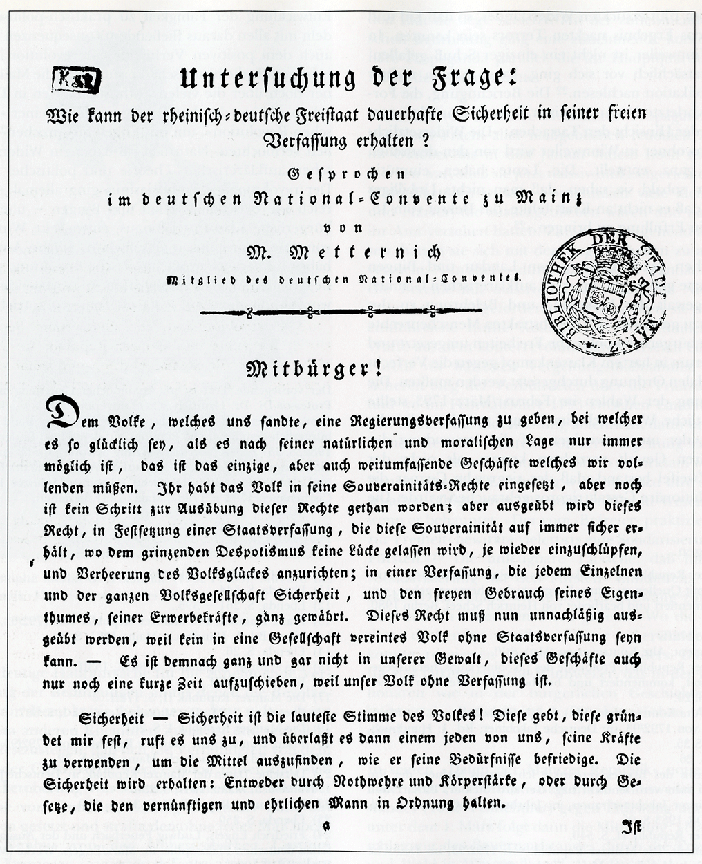 Abdruck einer Rede von Mathias Metternich